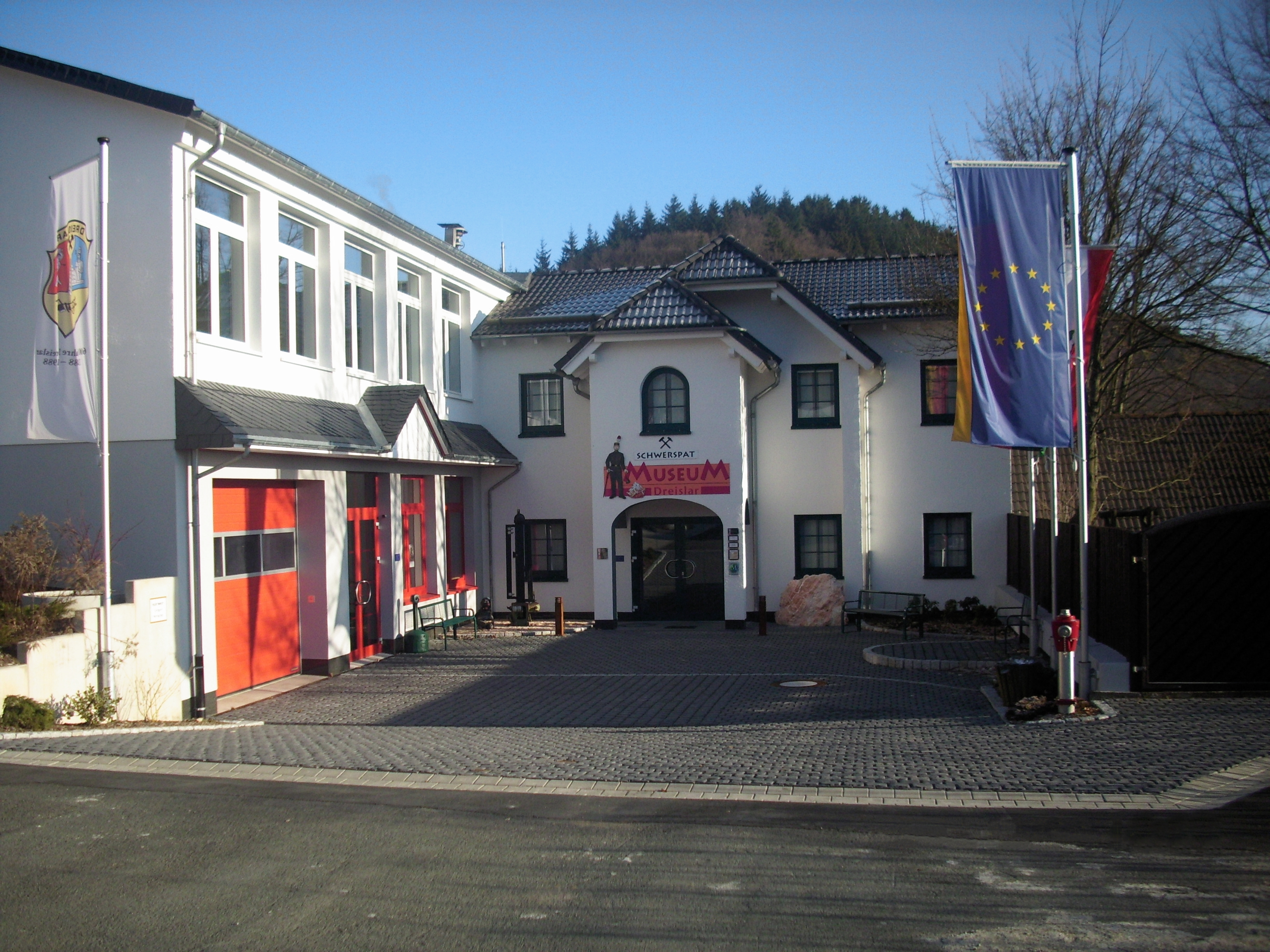 Schwerspatmuseum in Dreislar, Stadt Medebach (Hochsauerlandkreis)